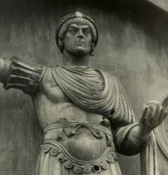 Escultura en la que se representa al emperador del Oeste, Valentiniano I